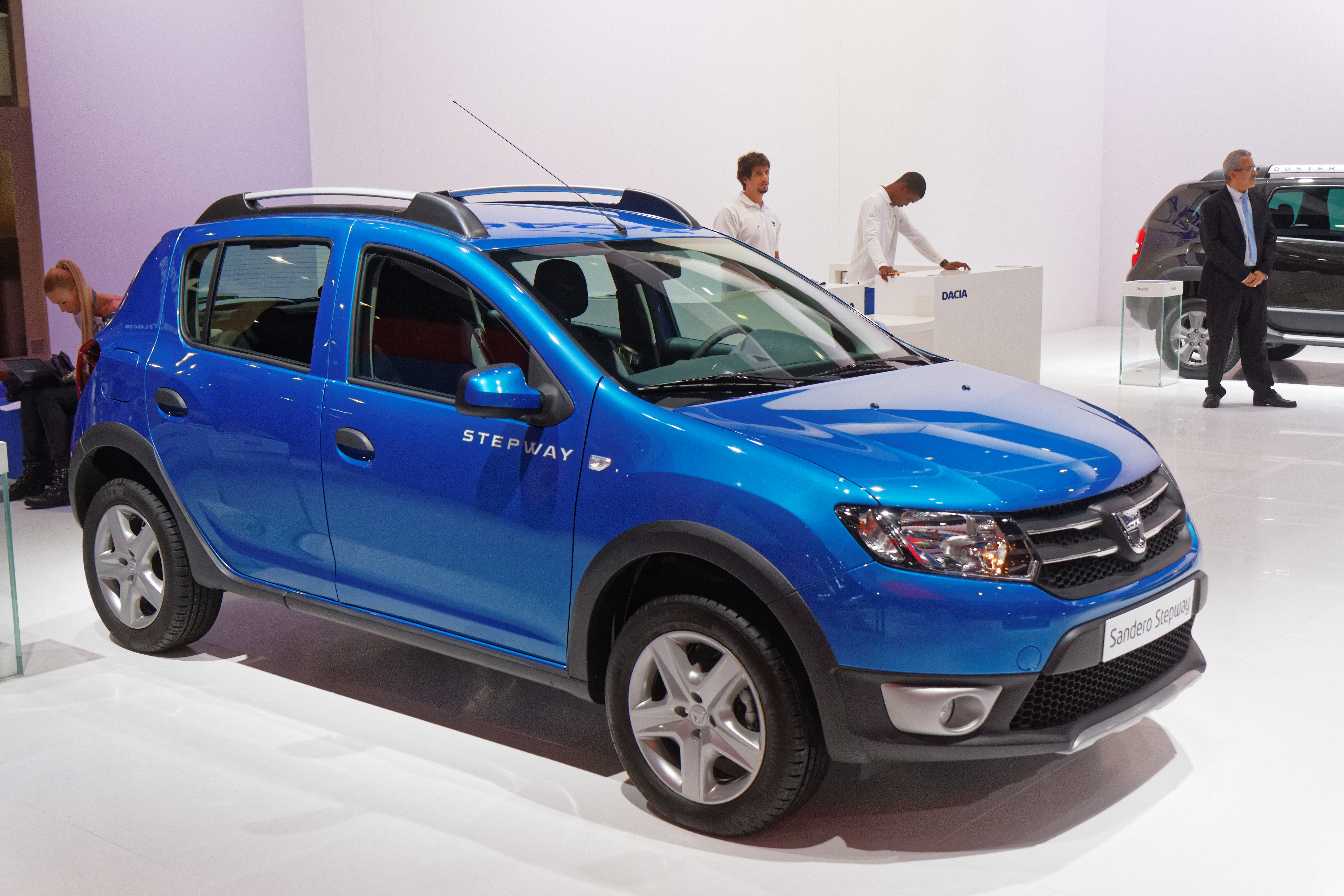 Une Dacia Sandero Stepway présentée lors du mondial de l'automobile de Paris 2014.